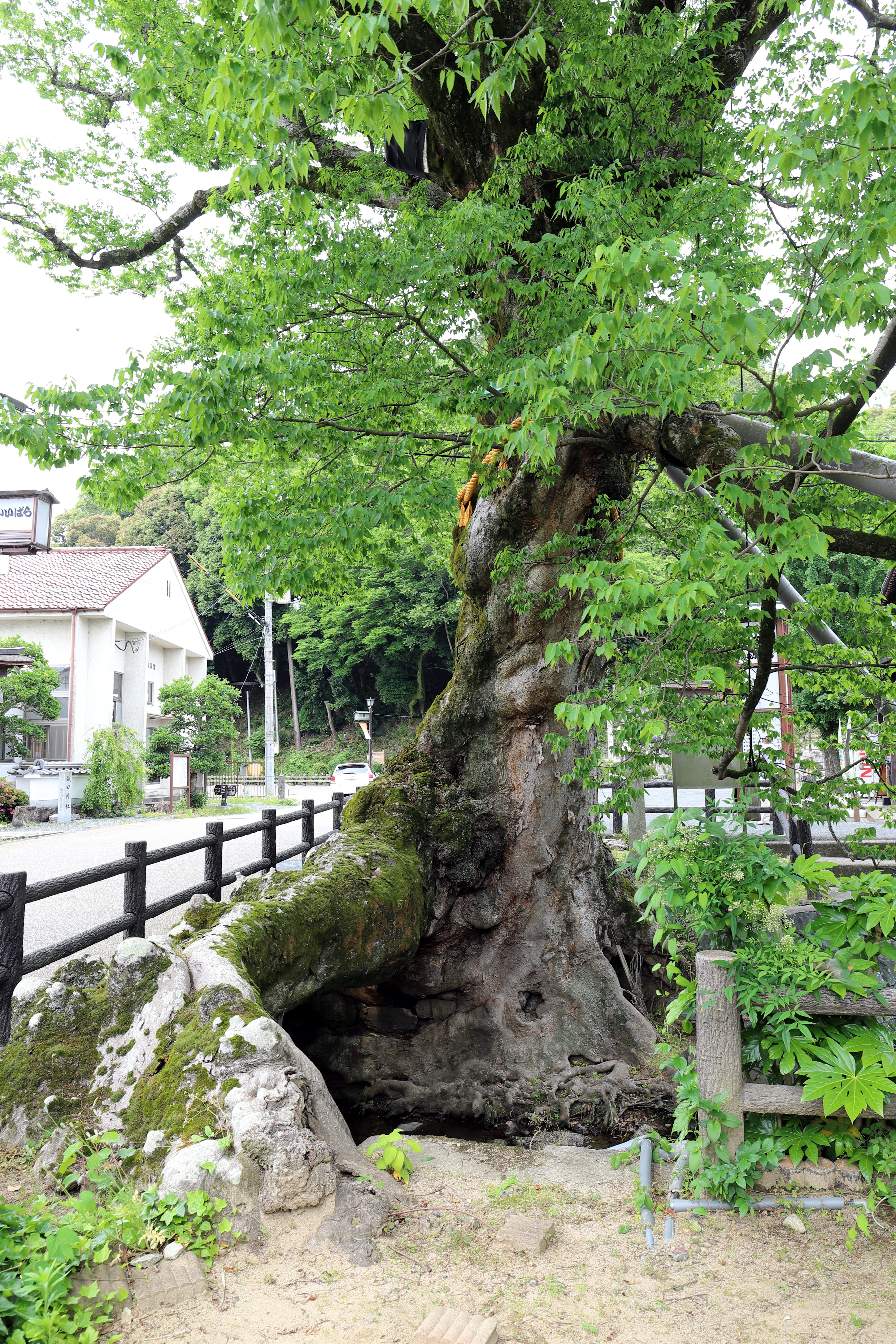 柏原の大ケヤキ（木の根橋） Canon EOS 6D Mark II